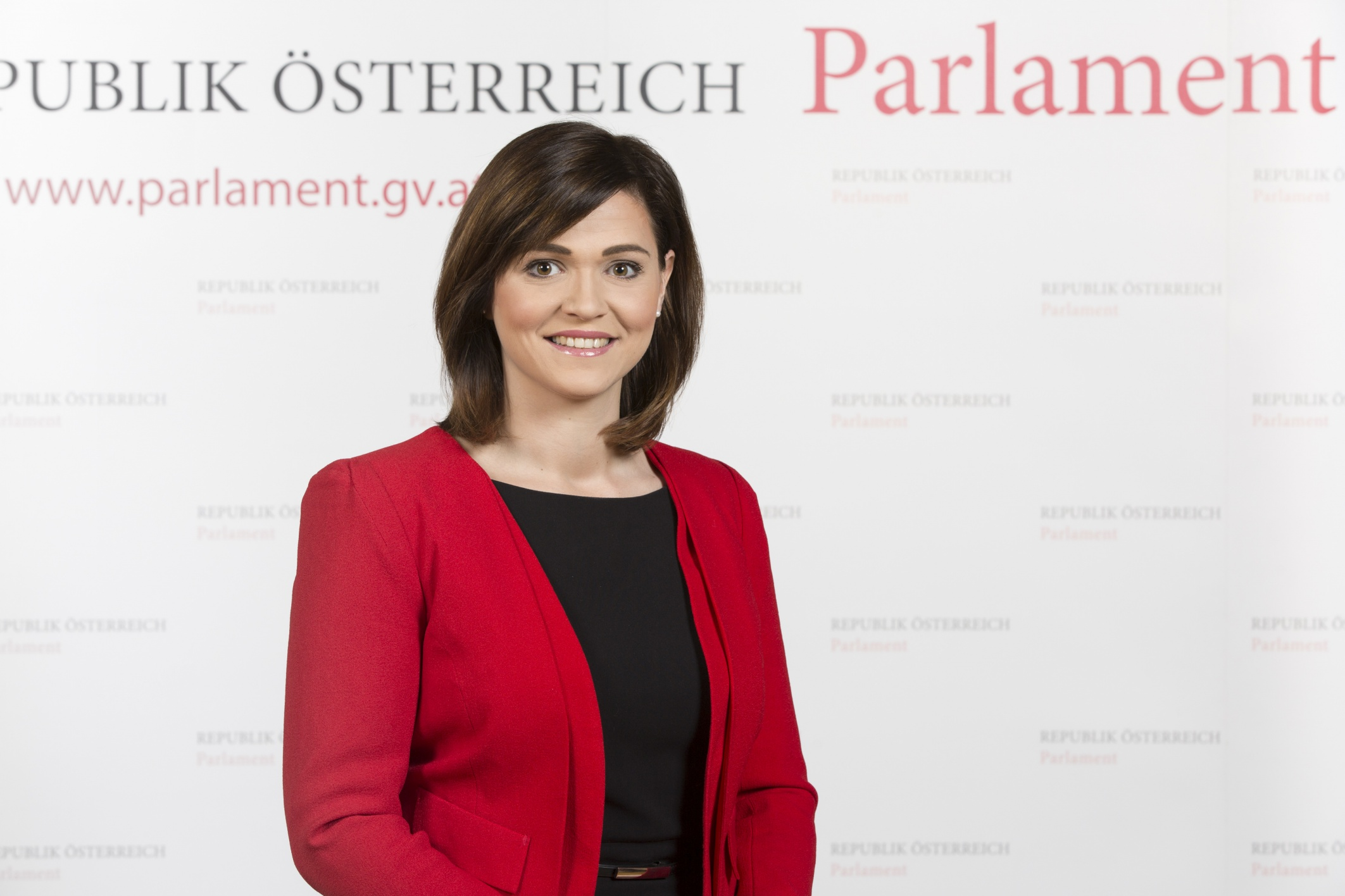 Daniela Holzinger-Vogtenhuber - Nationalratsabgeordnete